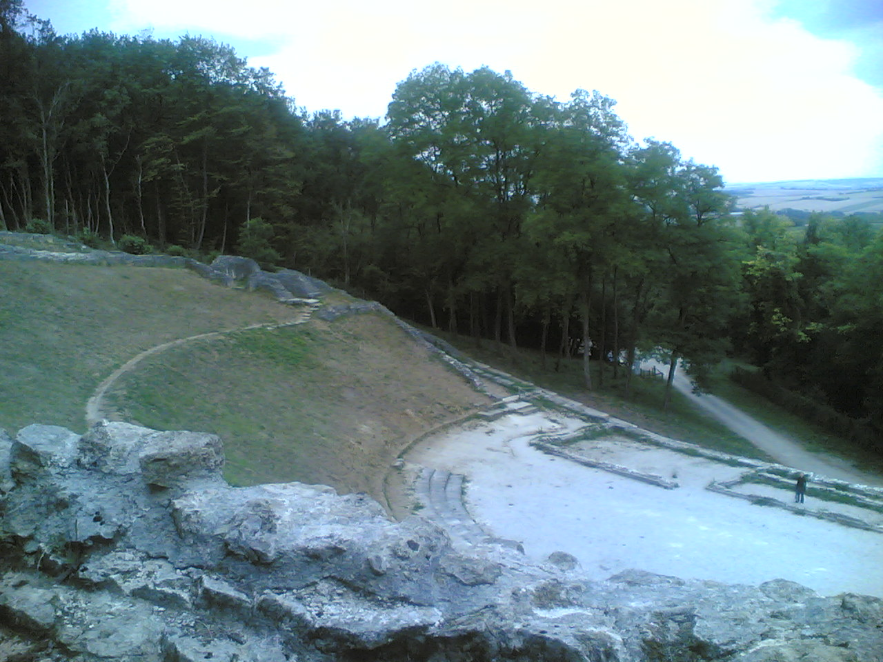 Théâtre gallo-romain des Bouchauds (photo prise en août 2005)